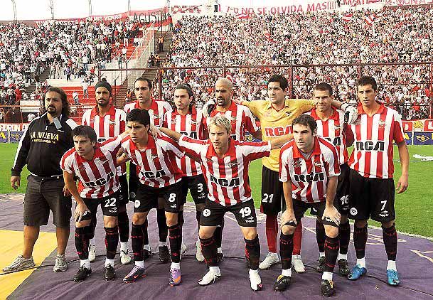 Una formación de Estudiantes de La Plata, subcampeón del Torneo Clausura 2010 del fútbol argentino. Arriba: Marcos Angeleri, Leandro Desábato, Christian Cellay, Juan Sebastián Verón, Agustín Orión, Germán Ré y José Sosa; abajo: Rodrigo Braña, Enzo Pérez, Gastón Fernández y Mauro Boselli.